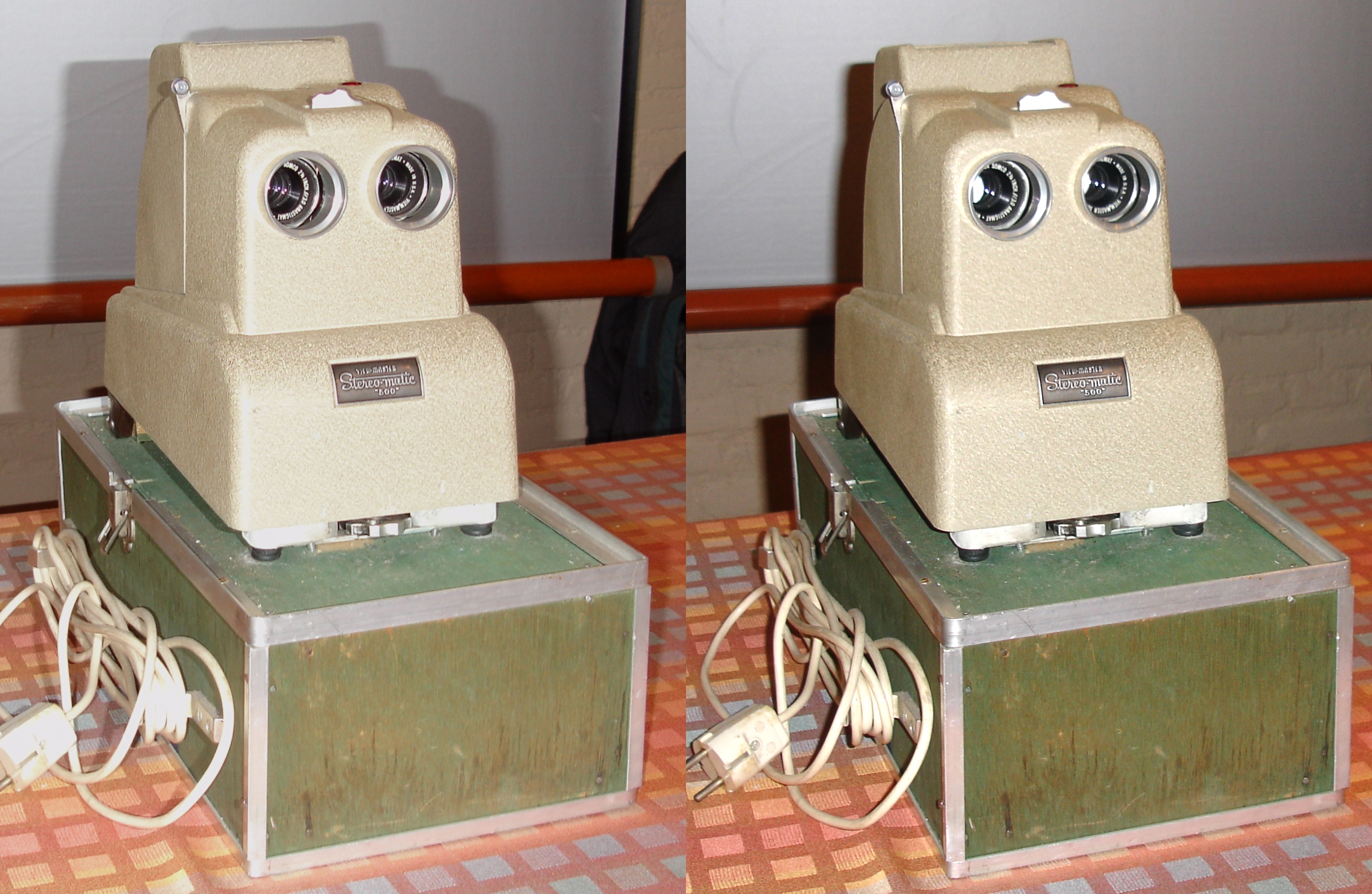 Stereoprojector